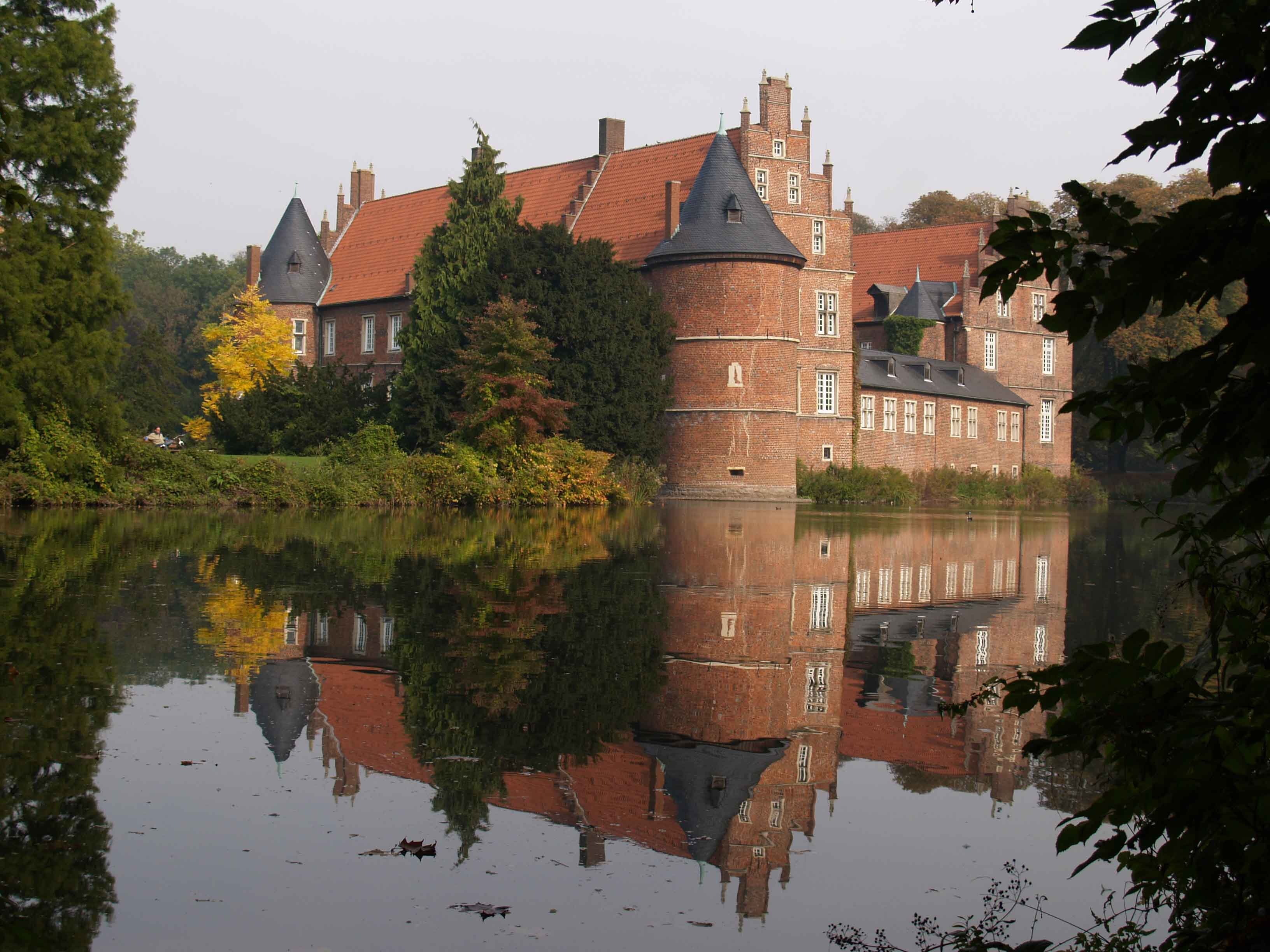 Schloss Herten, Blick über die Gräfte auf die West- und Südseite